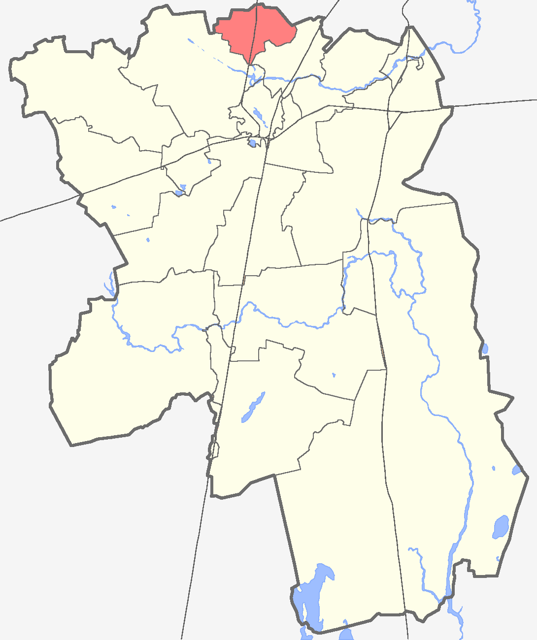 Таицкое городское поселение на карте Гатчинского района